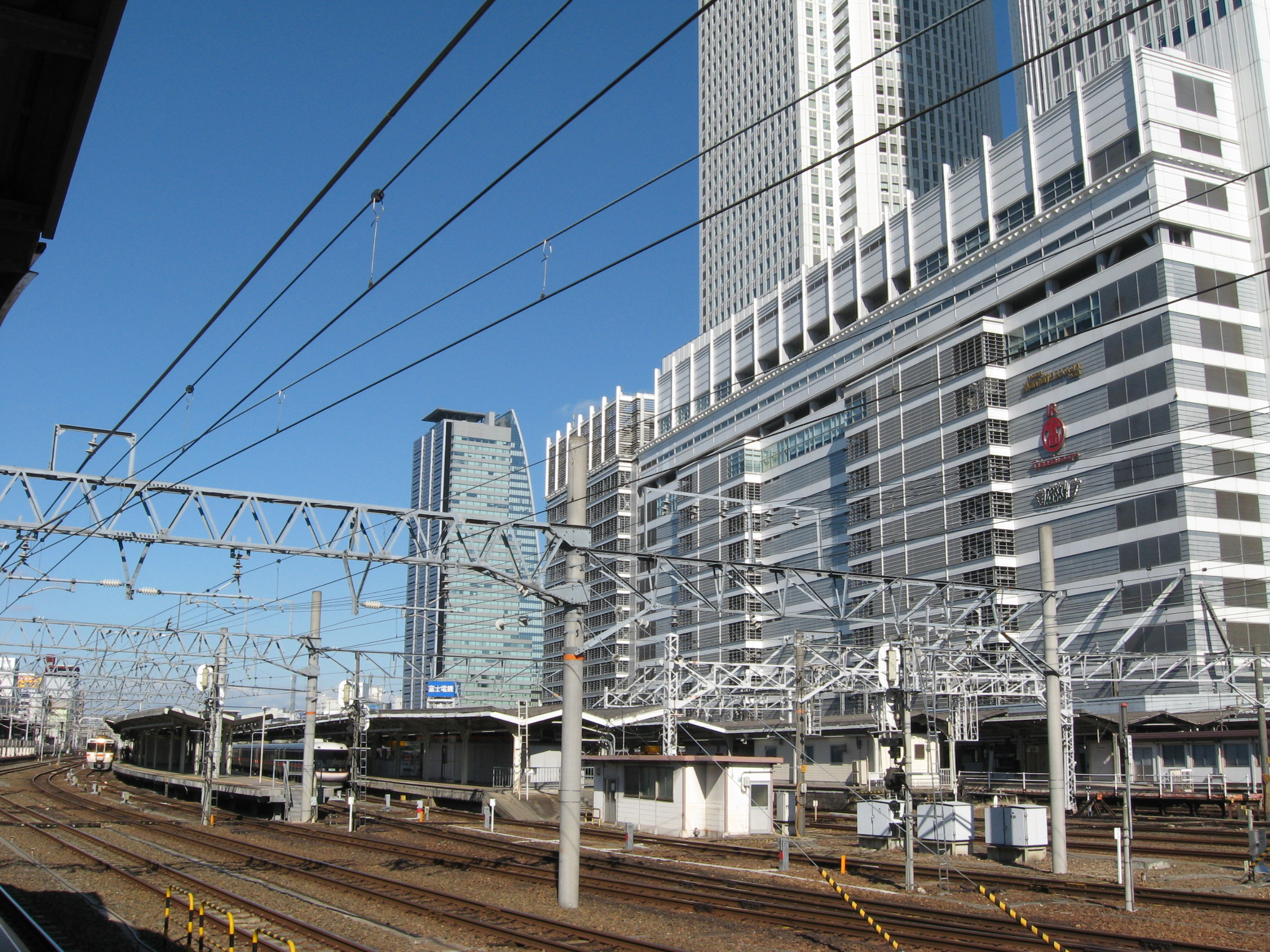 JR名古屋駅